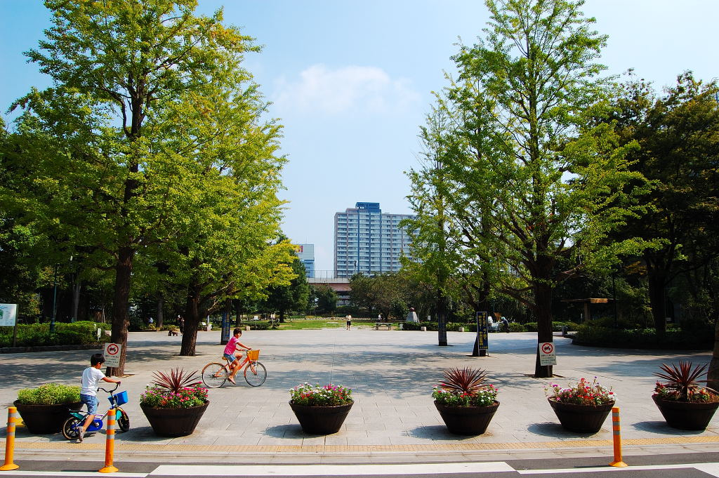 浜町公園（中央区日本橋浜町2-59、浜町駅最寄り）